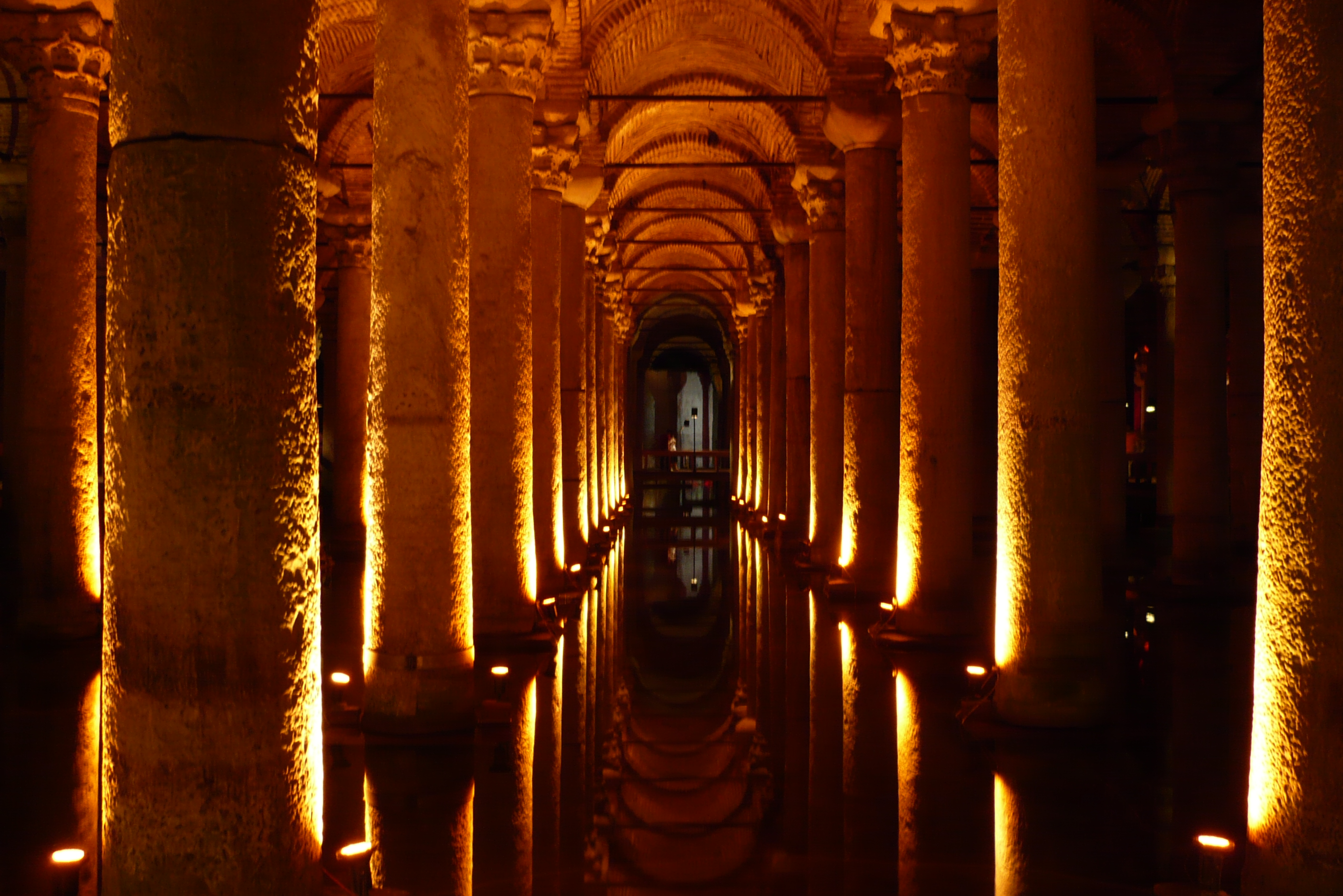 La basilica cisterna di Istanbul